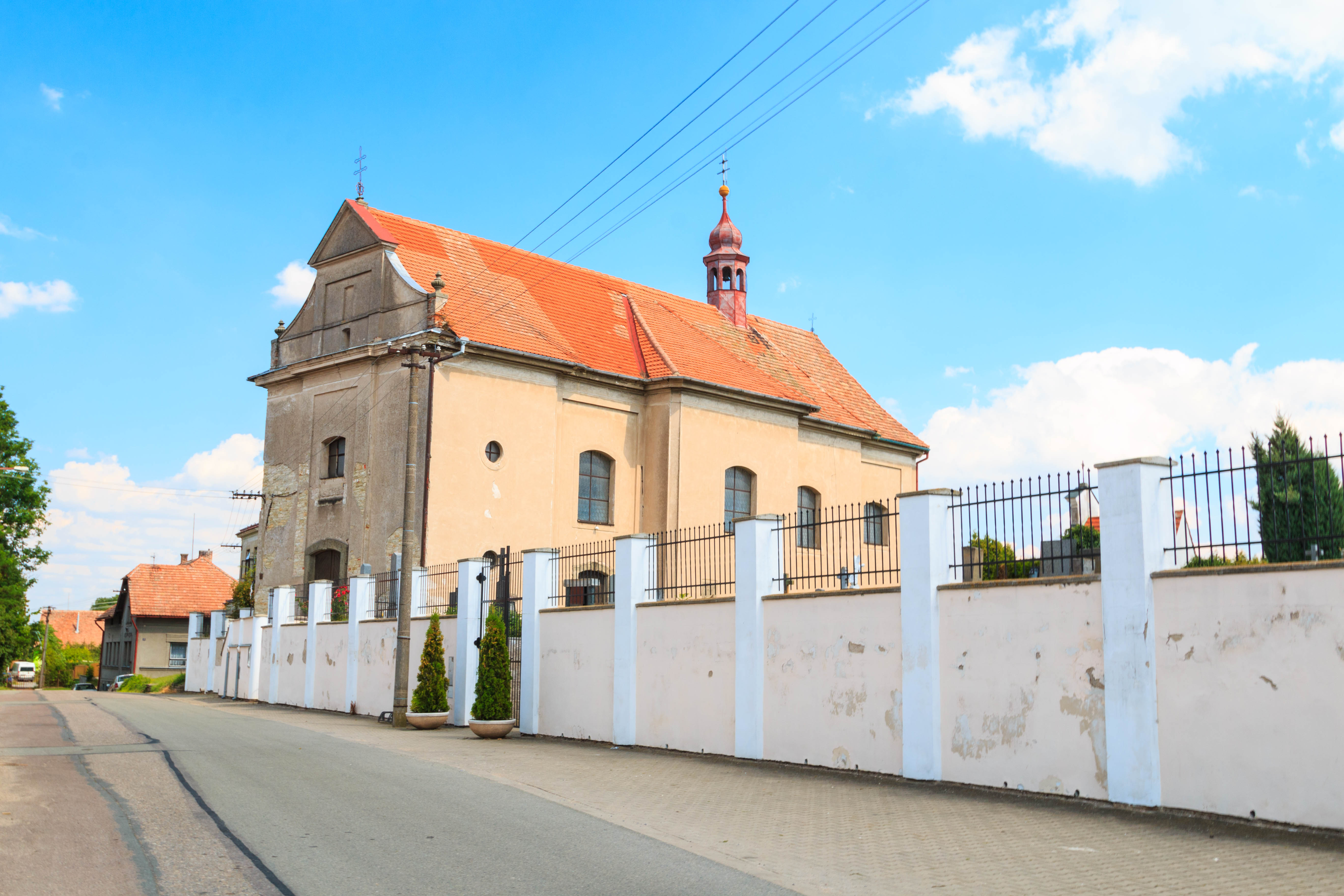 Kostel svatého Václava, Rosice 340, Rosice (okres Chrudim).